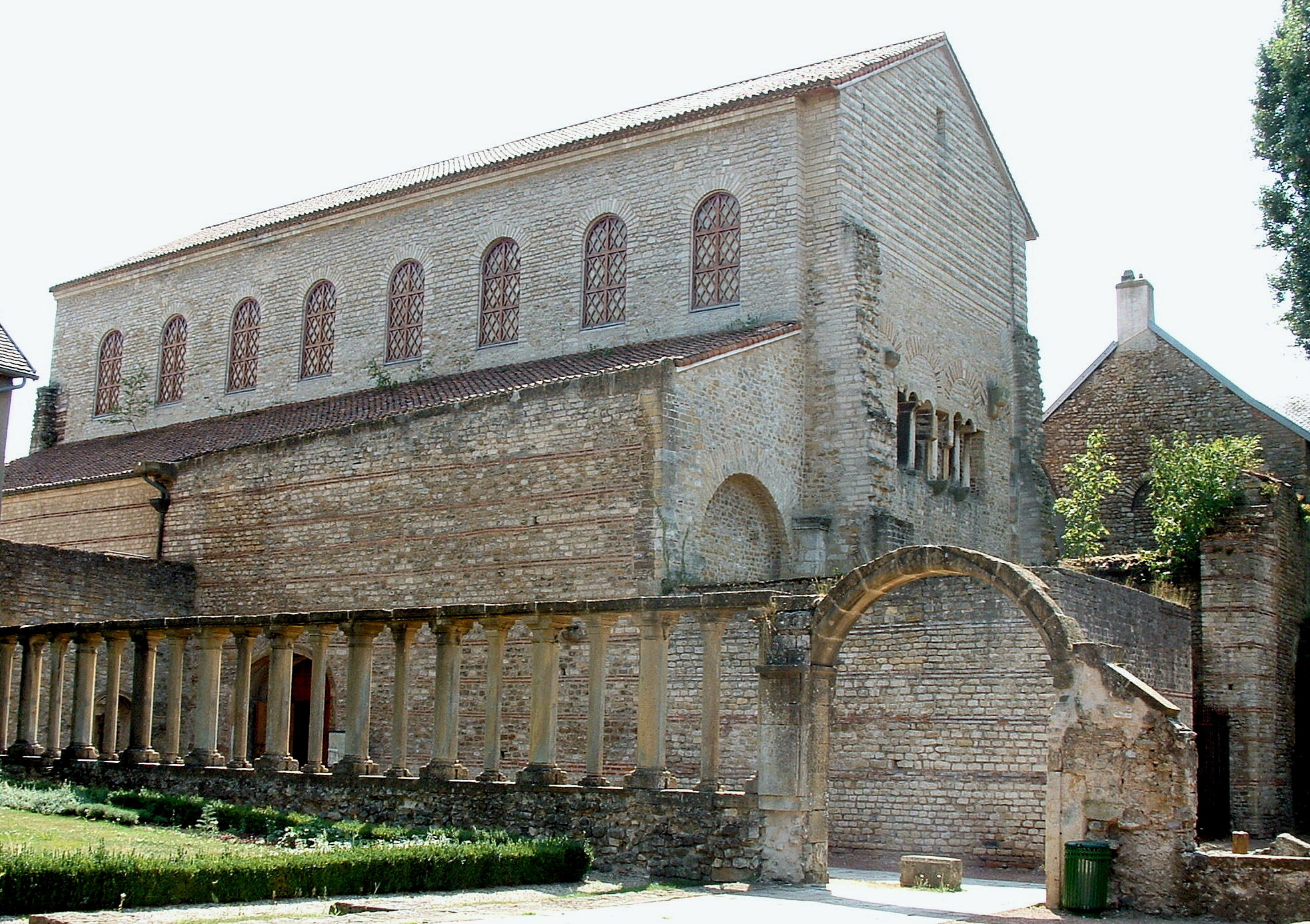 Metz - Église Saint-Pierre-aux-Nonnains - Côté Est après restauration